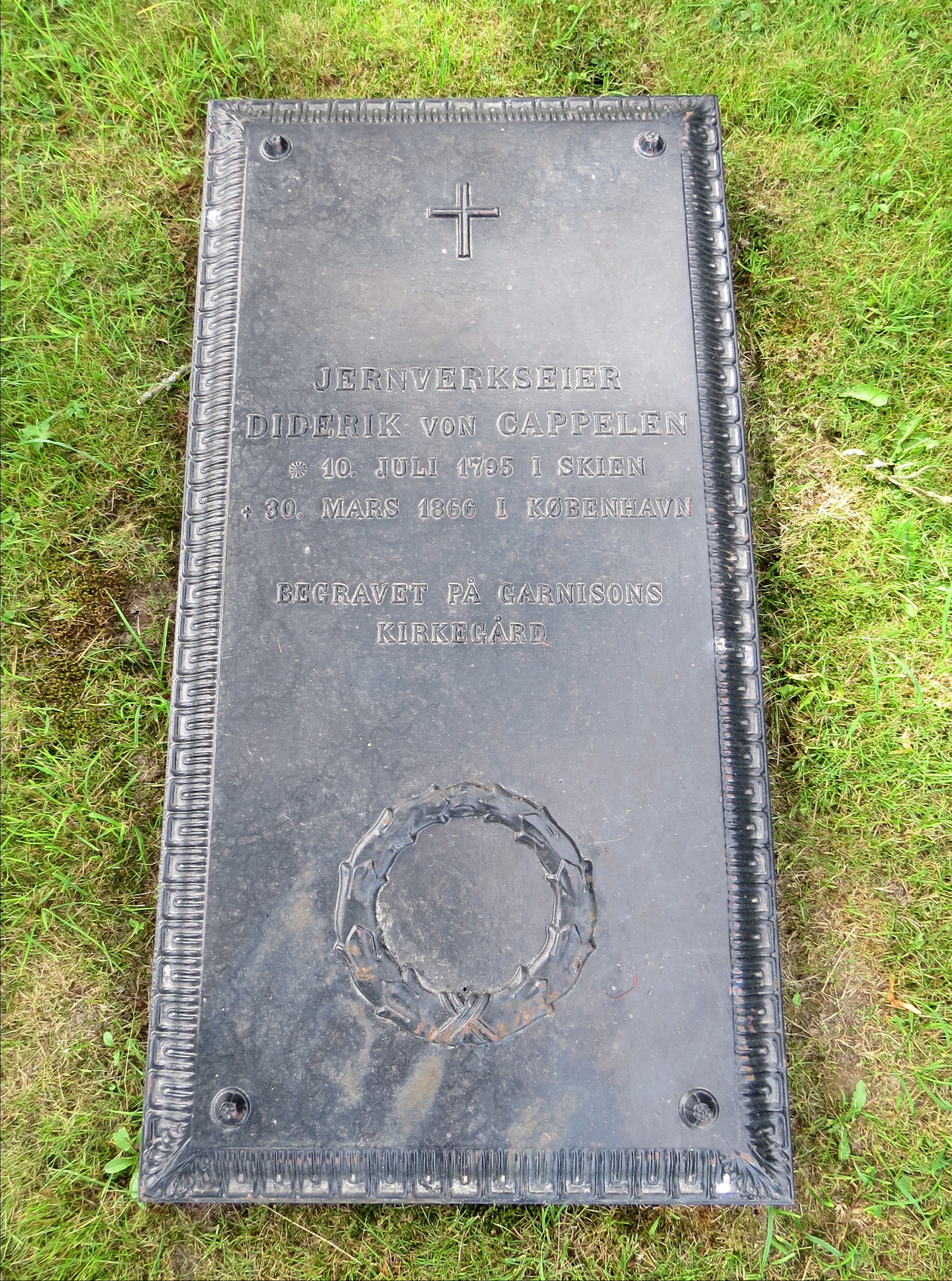 Jernverkseier, Diderik von Cappelen, * 10. Juli 1795 i Skien, † 30 Mars 1866 i København, begravet på Garnisons Kirkegård. Nome i Telemark